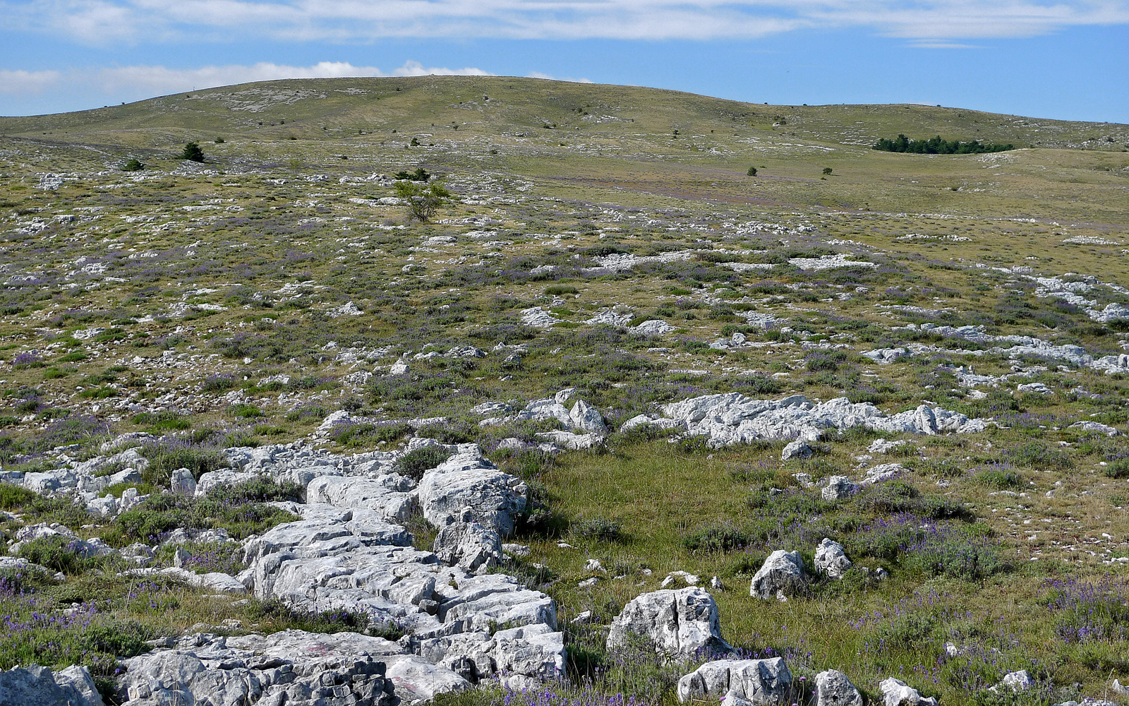 Vue du plateau karstique, en été. Au fond le sommet de Calern (1458 m).